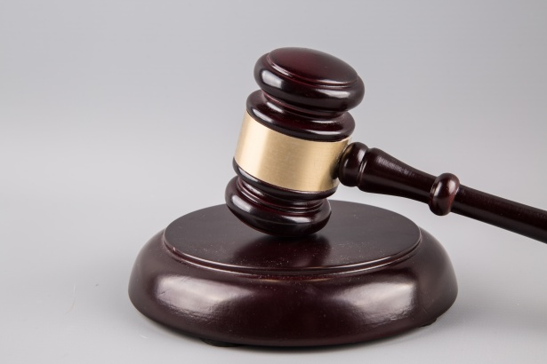 Imagen de mazo judizial.